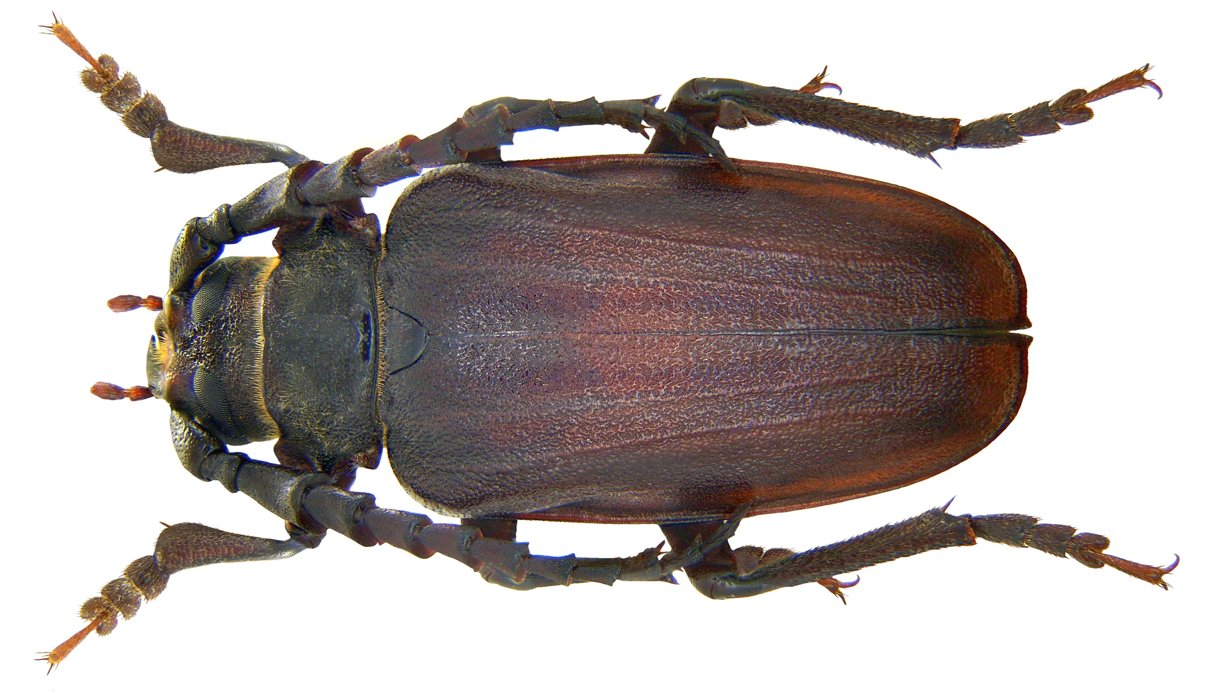 Familie: Cerambycidae Groesse: 18-45 mm Verbreitung: Europa, Nordafrika Ökologie: Entwicklung in morschem Nadel- und Laubholz Fundort: Italien, Südtirol, Vinschgau, Latsch leg.det. U.Schmidt, 1972 Foto: U.Schmidt, 2009